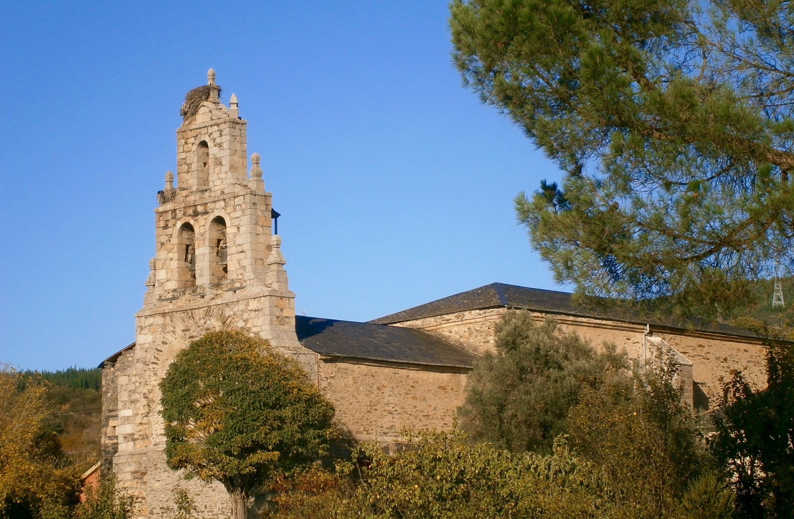 Iglesia Parroquial de San Cristobal, de Cubillos del Sil.